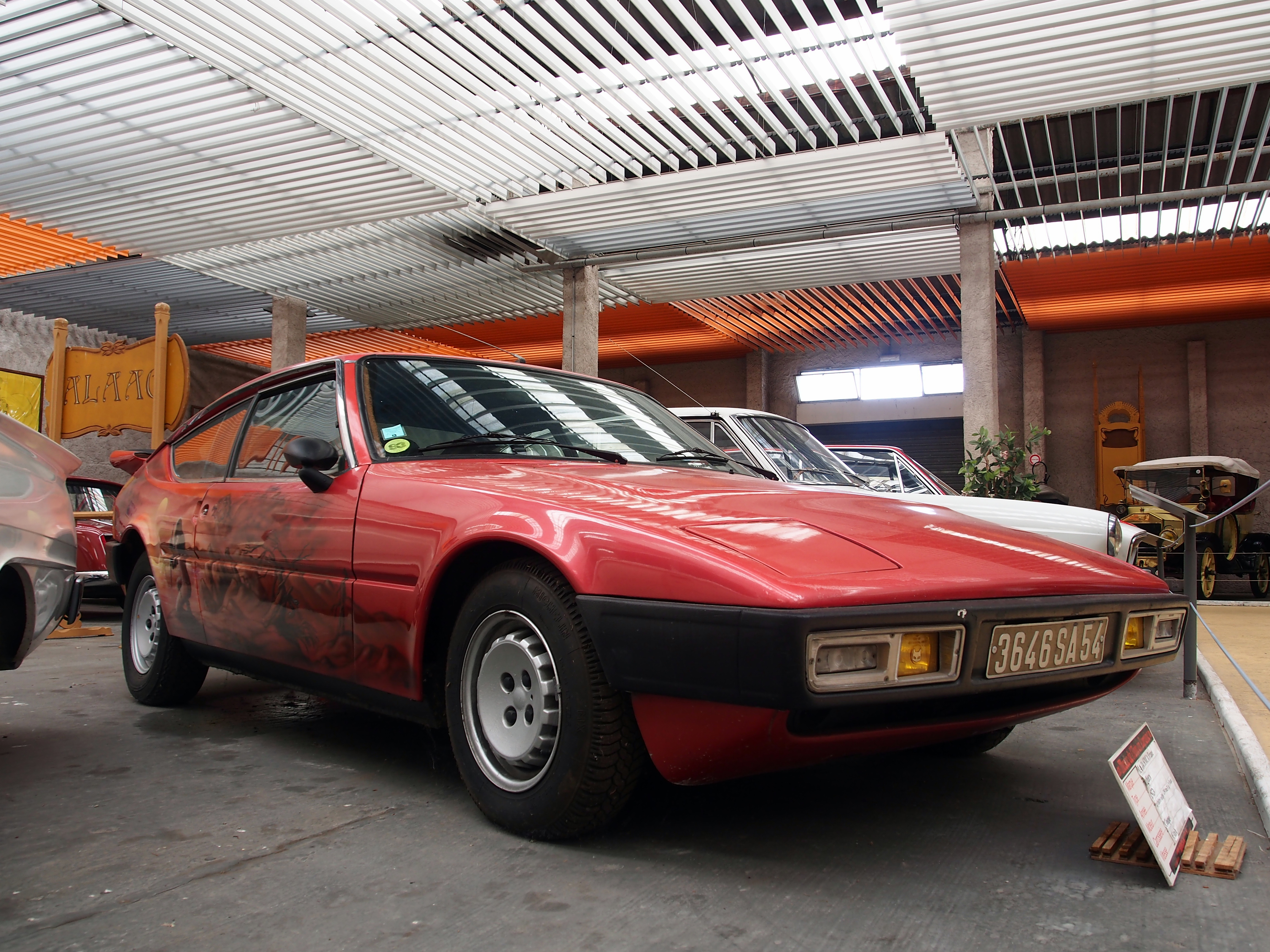 Photographed at the Association Lorraine des Amateurs d'Automobiles de collection et de loisirs.